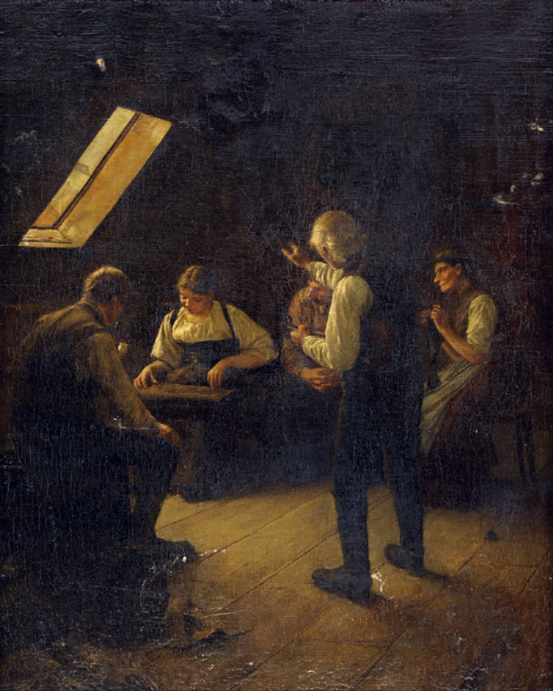 Dachstubenmusikanten. Signiert. Öl auf Leinwand, 57 x 46,5 cm